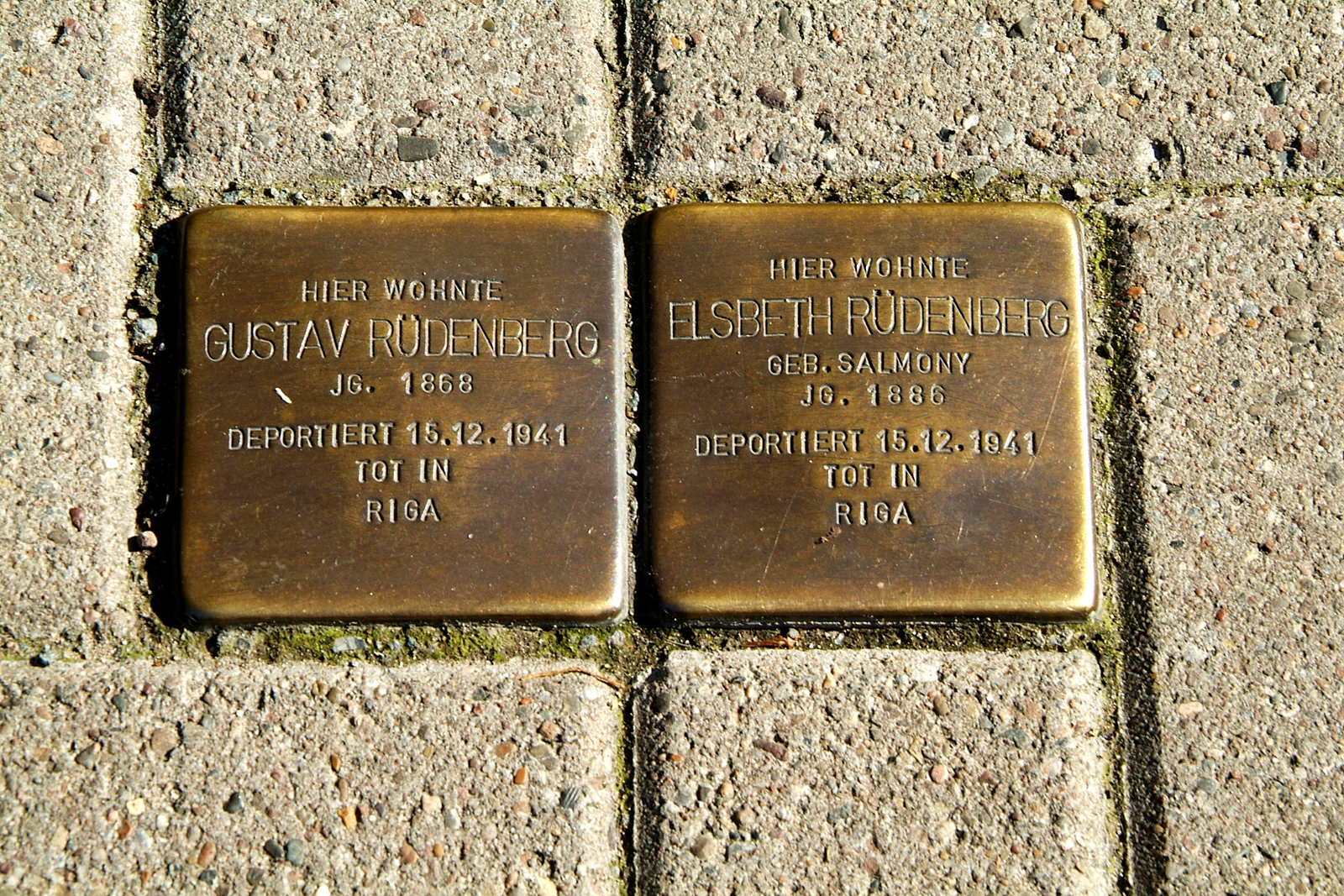 Die Stolpersteine vor der Podbielskistraße 36 in Hannover, Stadtteil List erinnern an die Verbrechen durch die Nationalsozialisten: Gustav Rüdenberg, Jahrgang 1868, und Elsbeth, geborene Salmony, Jahrgang 1886, wurden am 15. Dezember 1941 aus Hannover deportiert; beide fanden ihren Tod in Riga ...